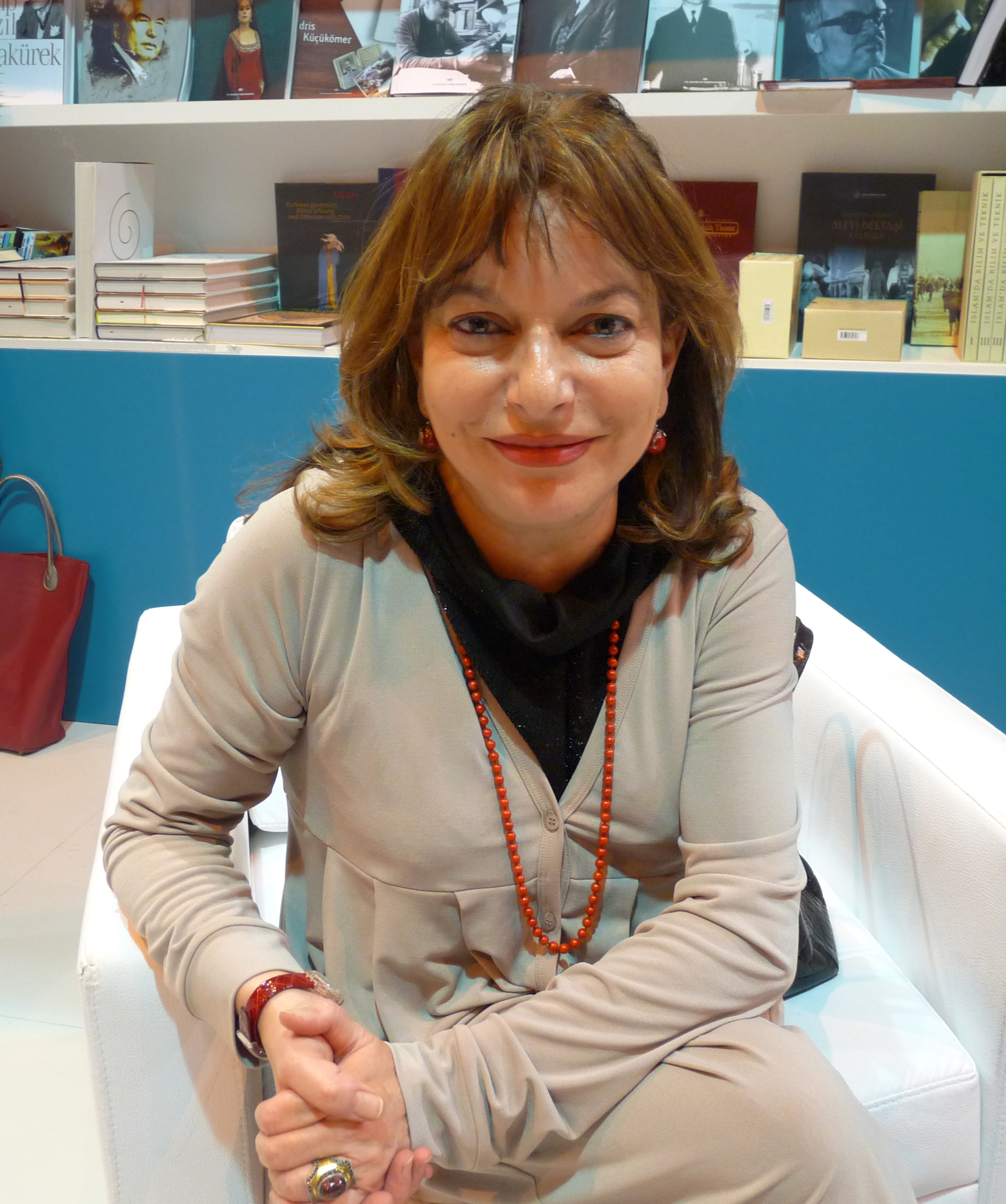 La femme de lettres et journaliste turque Mine G. Kirikkanat au Salon du Livre de Paris.